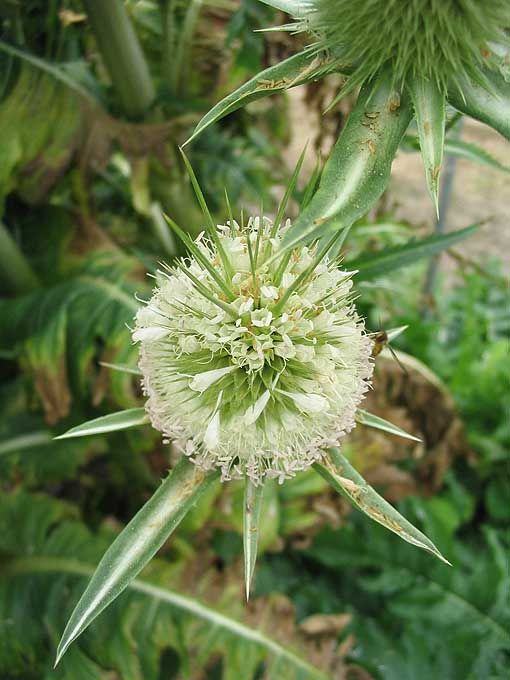 Dipsacus laciniatus (cardère laciniée), sommet de l'inflorescence Photo prise au parc botanique de Meise en août 2004 Jean Tosti 10/2004